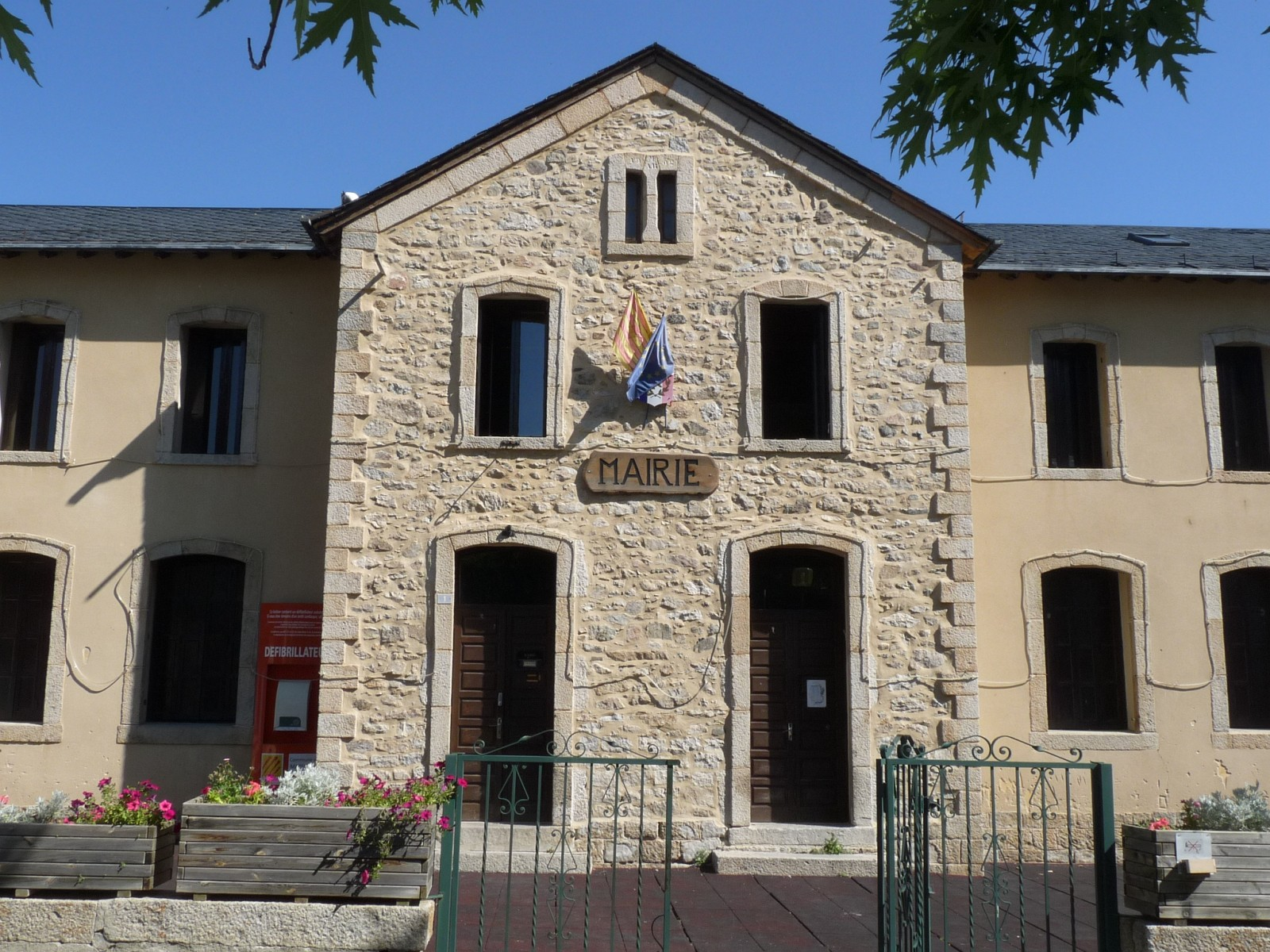 Mairie de Matemale, Pyrénées-Orientales, France